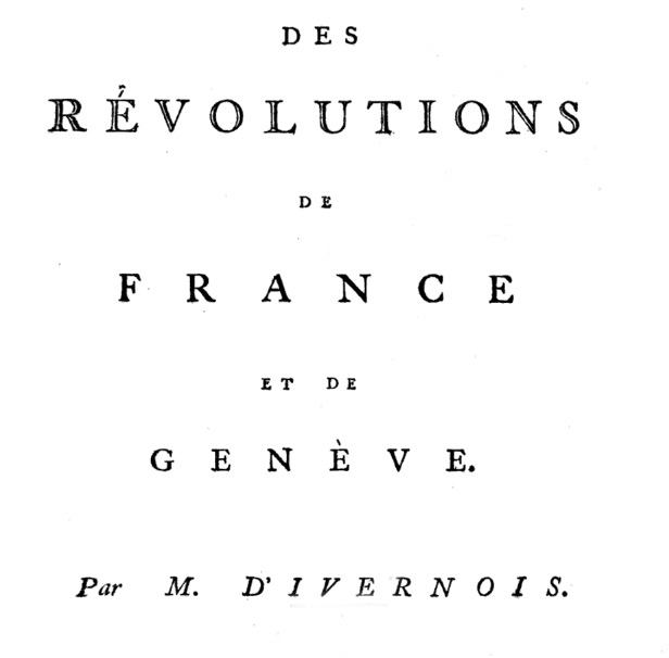 Page titre de l'essai : Des Révolutions de France et de Genève" par François d'Ivernois